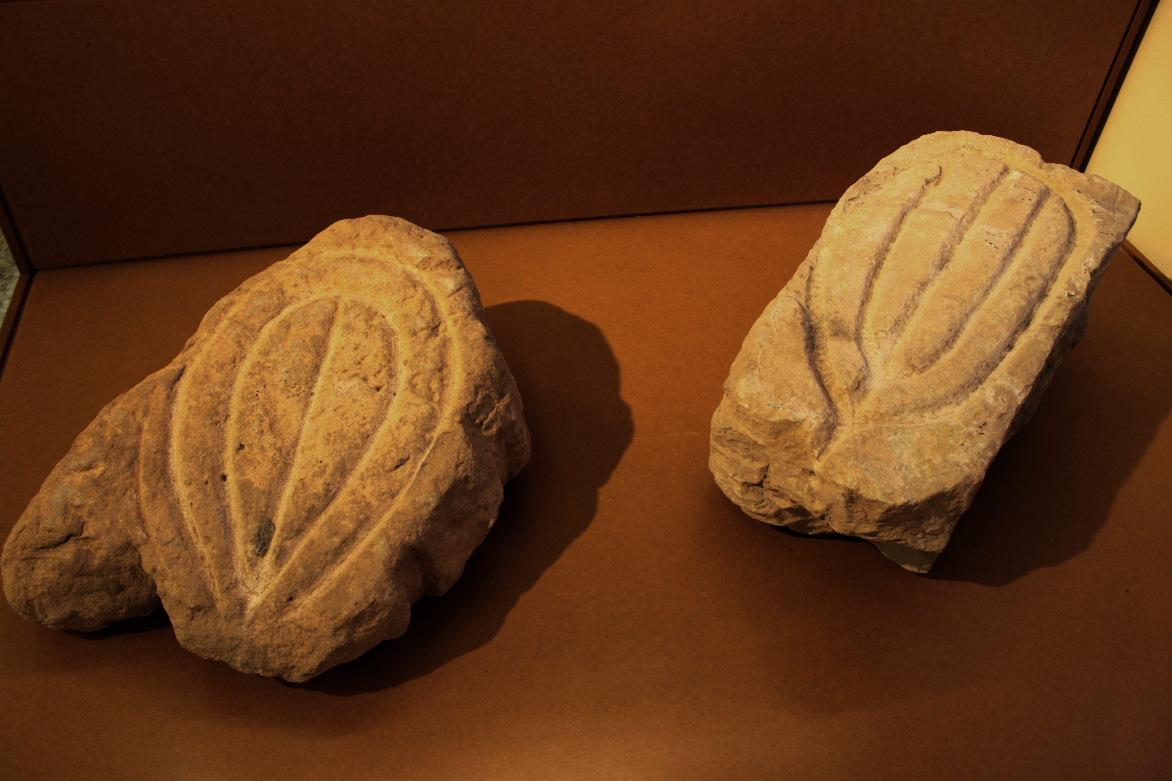 Aras pertenecientes a una prensa de aceite del yacimiento de La Seña de Villar del Arzobispo.Depositada en el Mudeo de Prehistoria de Valencia, Comunidad valenciana, España.